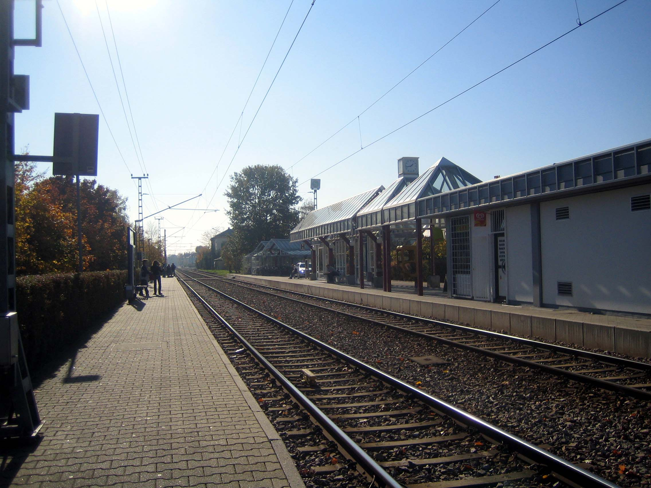 Beschreibung, Quelle und Lizenz Eggenstein Bf., selbst fotografiert 18:04, 28. Okt 2005 Antifaschist 666 2272 x 1704 (1191669 Byte) (Eggenstein Bf., selbst fotografiert)